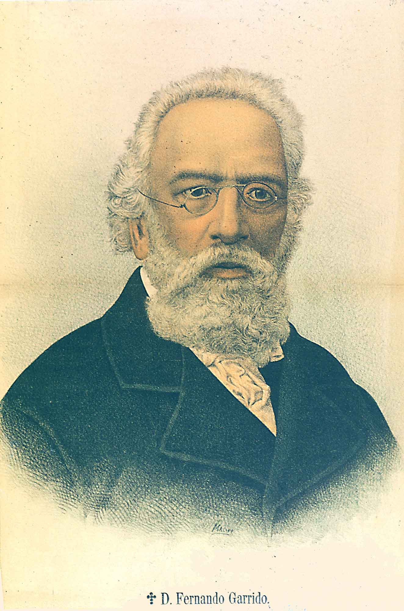 Retrato de Fernando Garrido